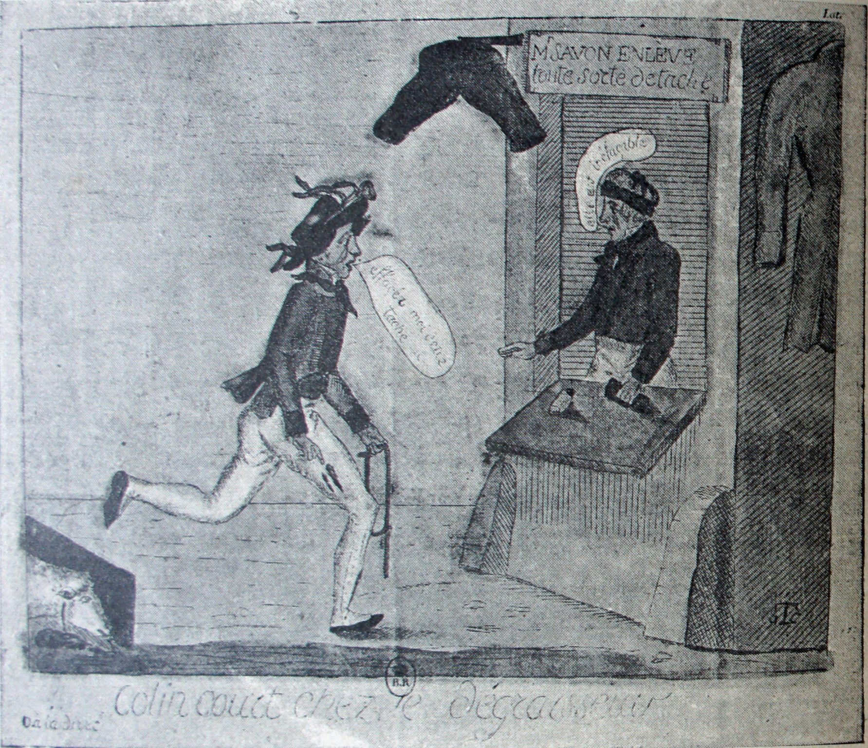 Colin court chez le dégraisseur, image caustique moquant la volonté de Caulincourt de laver son honneur dans l'affaire du duc d'Enghien. Image du XIXe siècle.